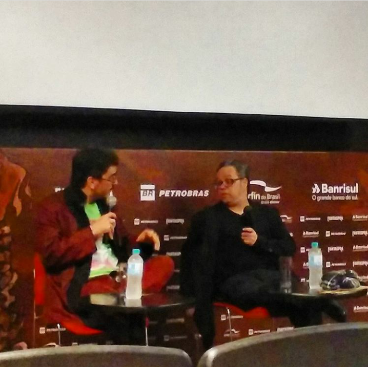 Gurcius Gewdner (a esquerda) apresentando seu filme Pazzucus no Fantaspoa 2017.